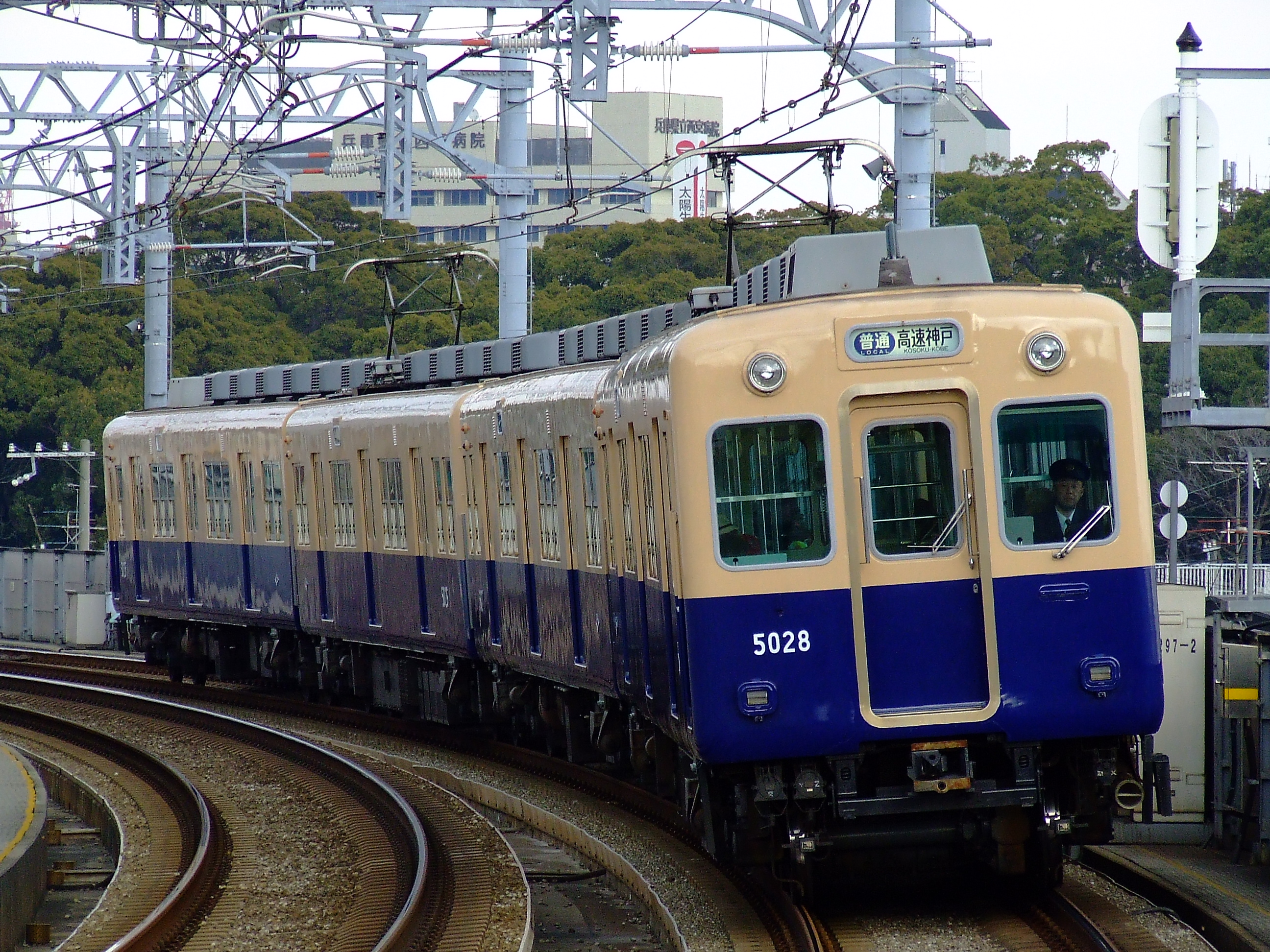 阪神電気鉄道5001形電車（5028～） 香櫨園駅にて